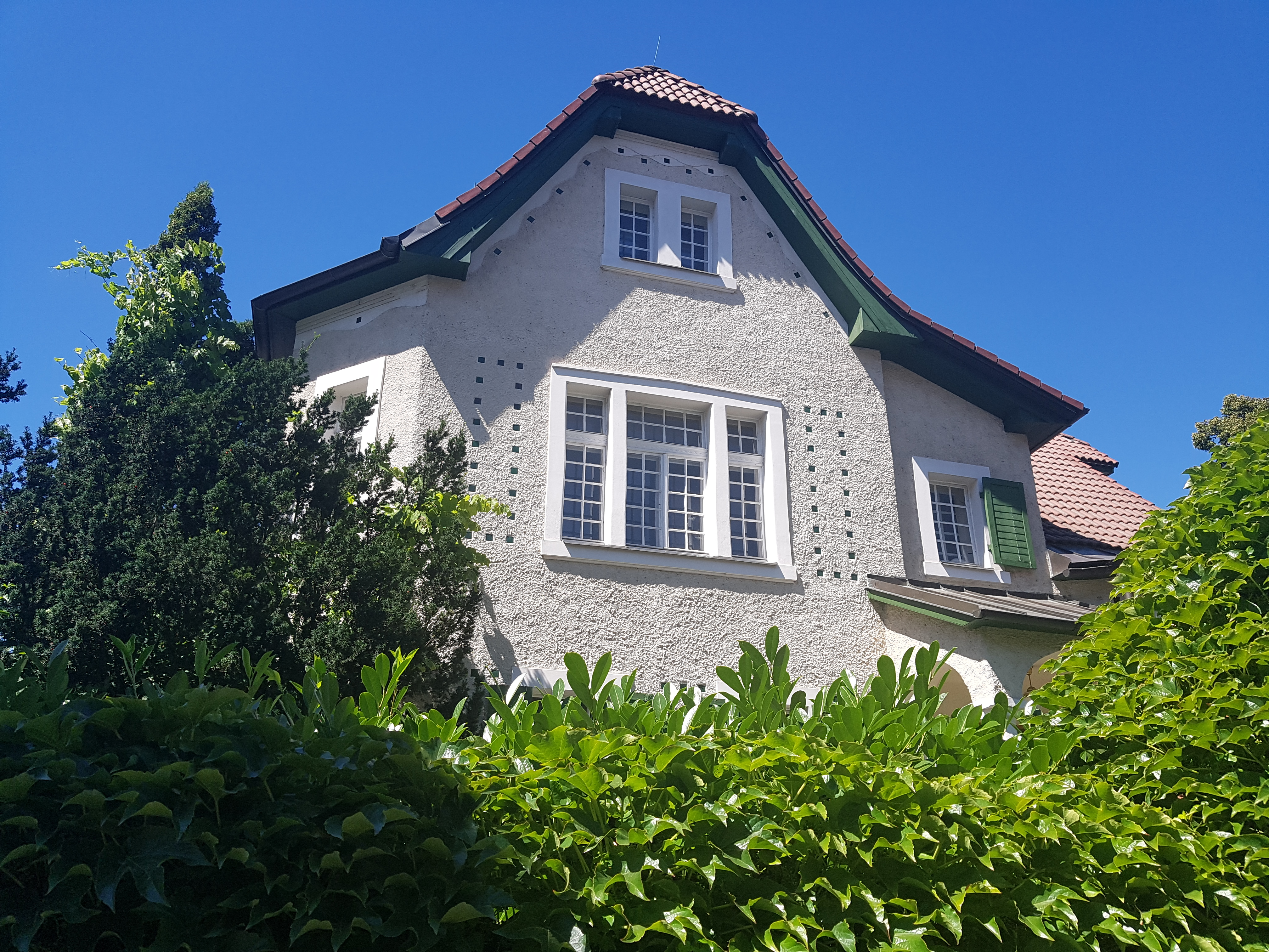 Vila Jana Sixty v Hradci Králové (2020)